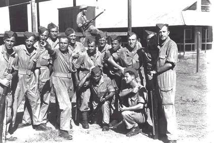 אורלנד ולהקת הבריגדה הראשונה-נתן כוגן הכי שמאלי